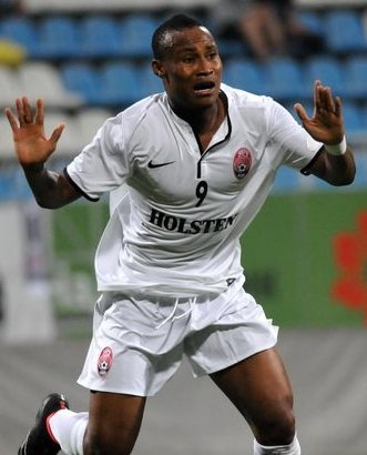 Прінс Сегбефія — тоголезький футболіст під час виступів за «Зорю»